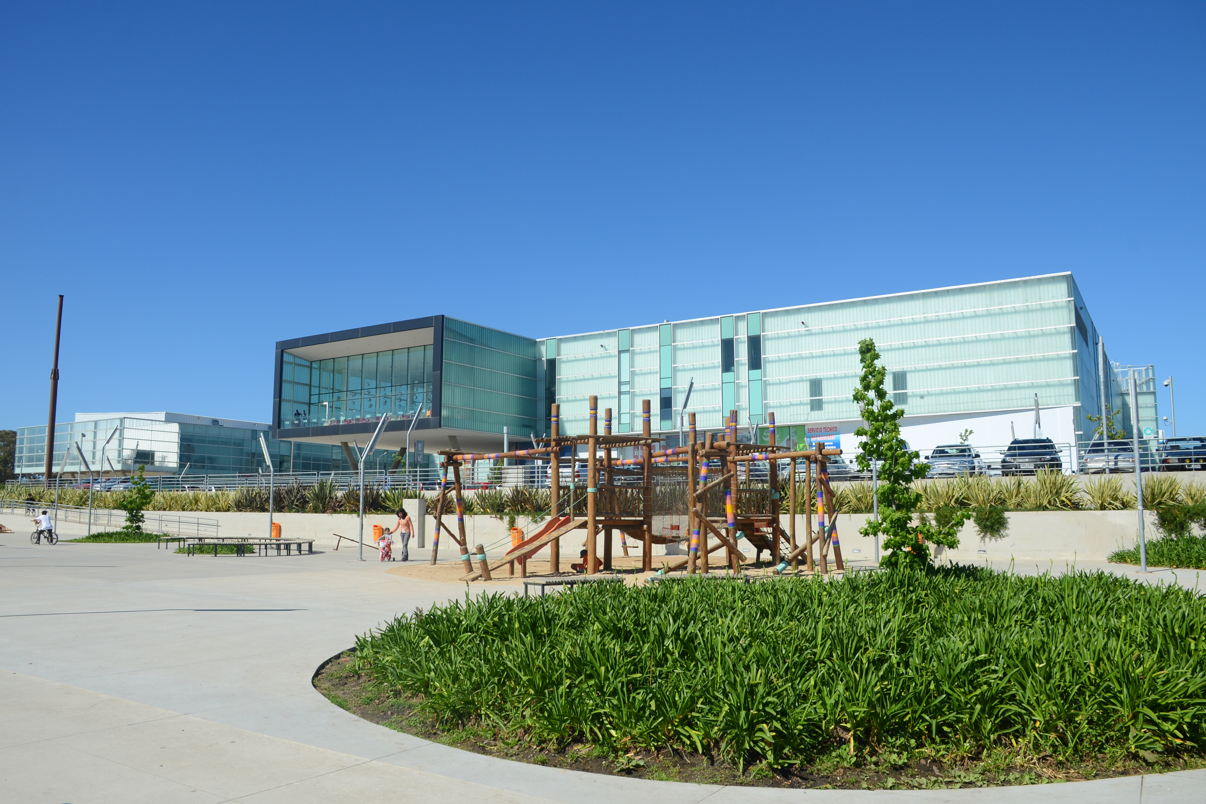 Foto del exterior del Costa Urbana Shopping durante el día.